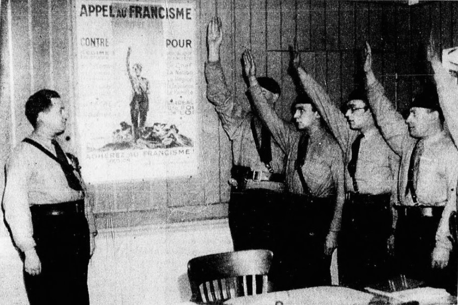 "Marcel Bucard entraîne [ses partisans] au salut à la Romaine".